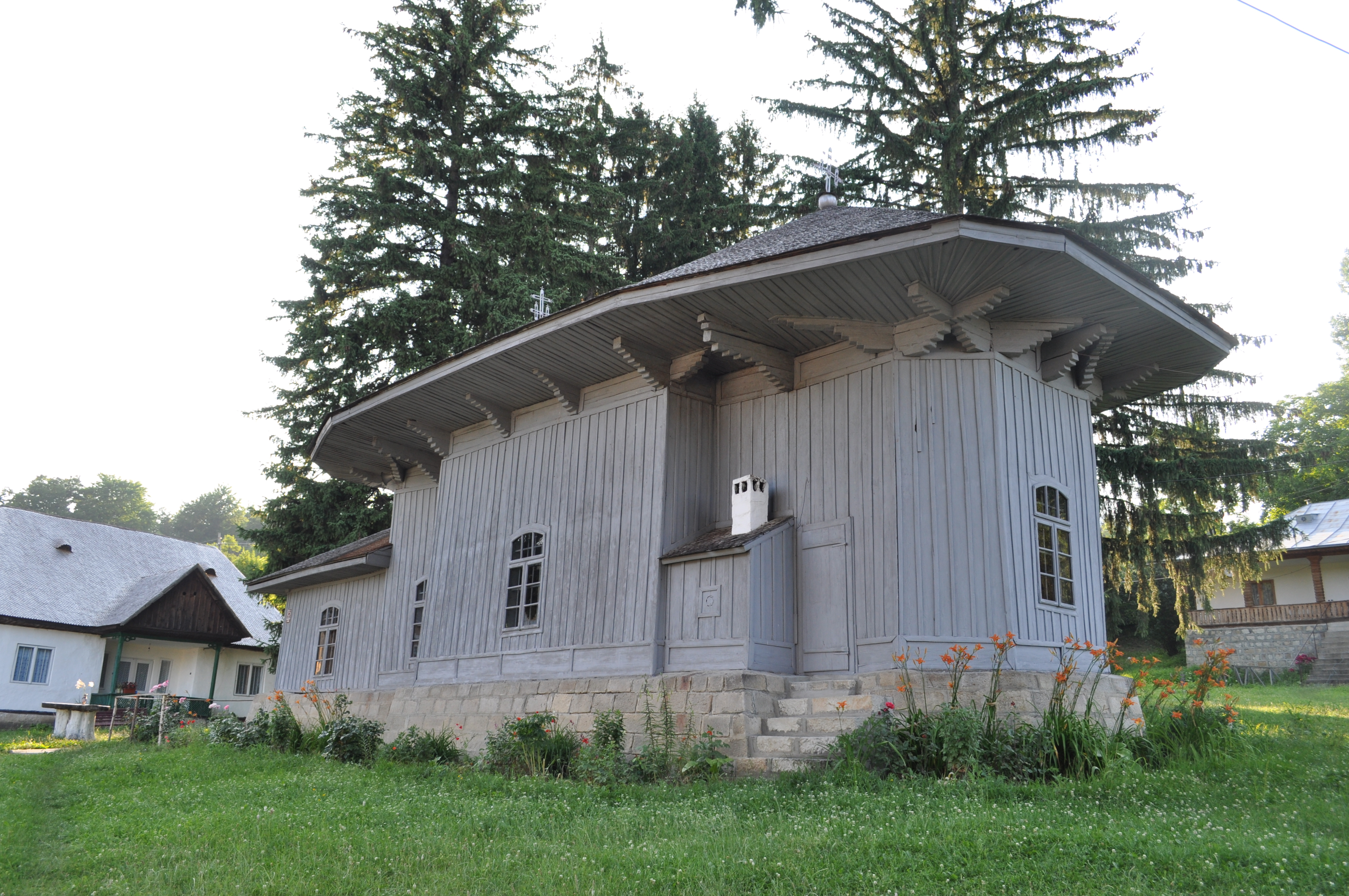 Schitul Valea Neagră, Vrancea 01